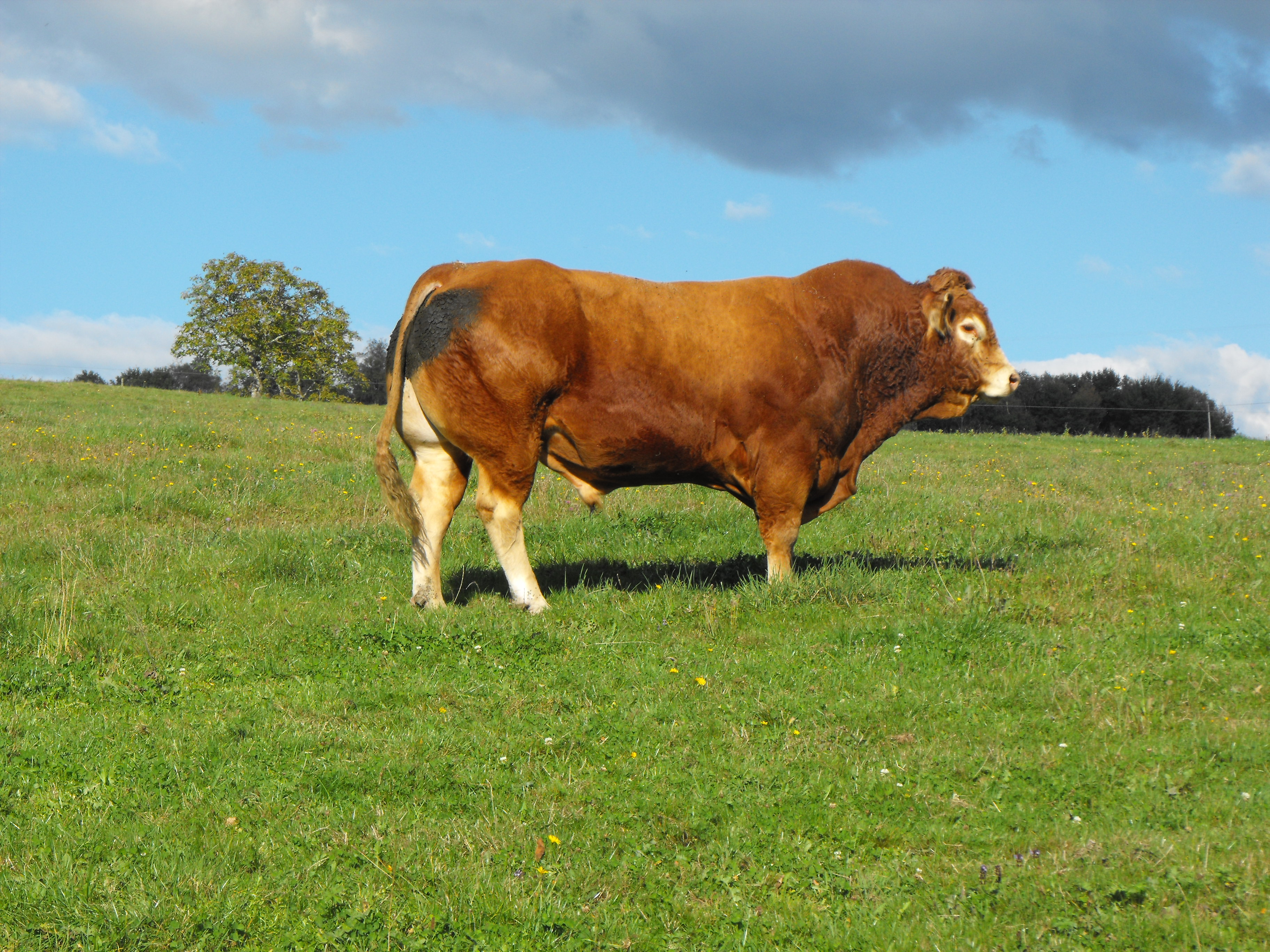 limousin